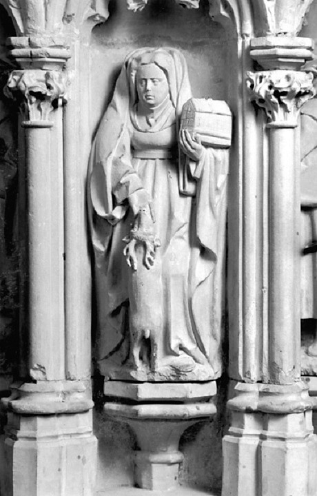 Skulptur der hl. Ida von Herzfeld (um 775–um 825) am Taufbecken in der St.-Ida-Kirche in Herzfeld. Foto: Westfälisches Landesmuseum für Kunst und Kulturgeschichte Münster / R. Walkonigg 2003.